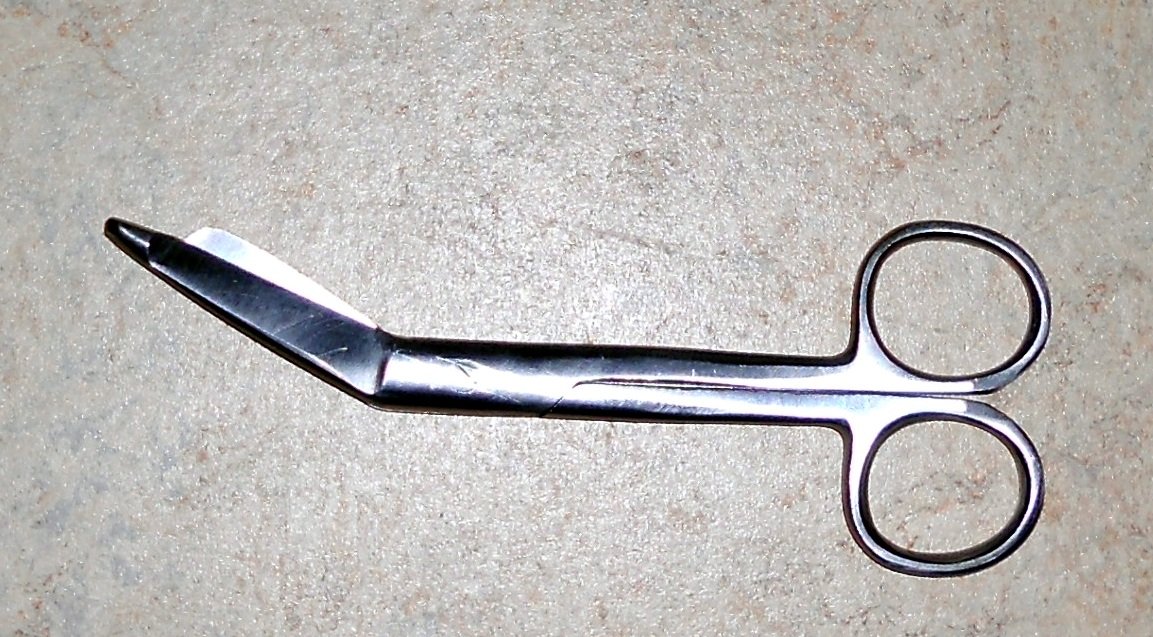 Verbandschere